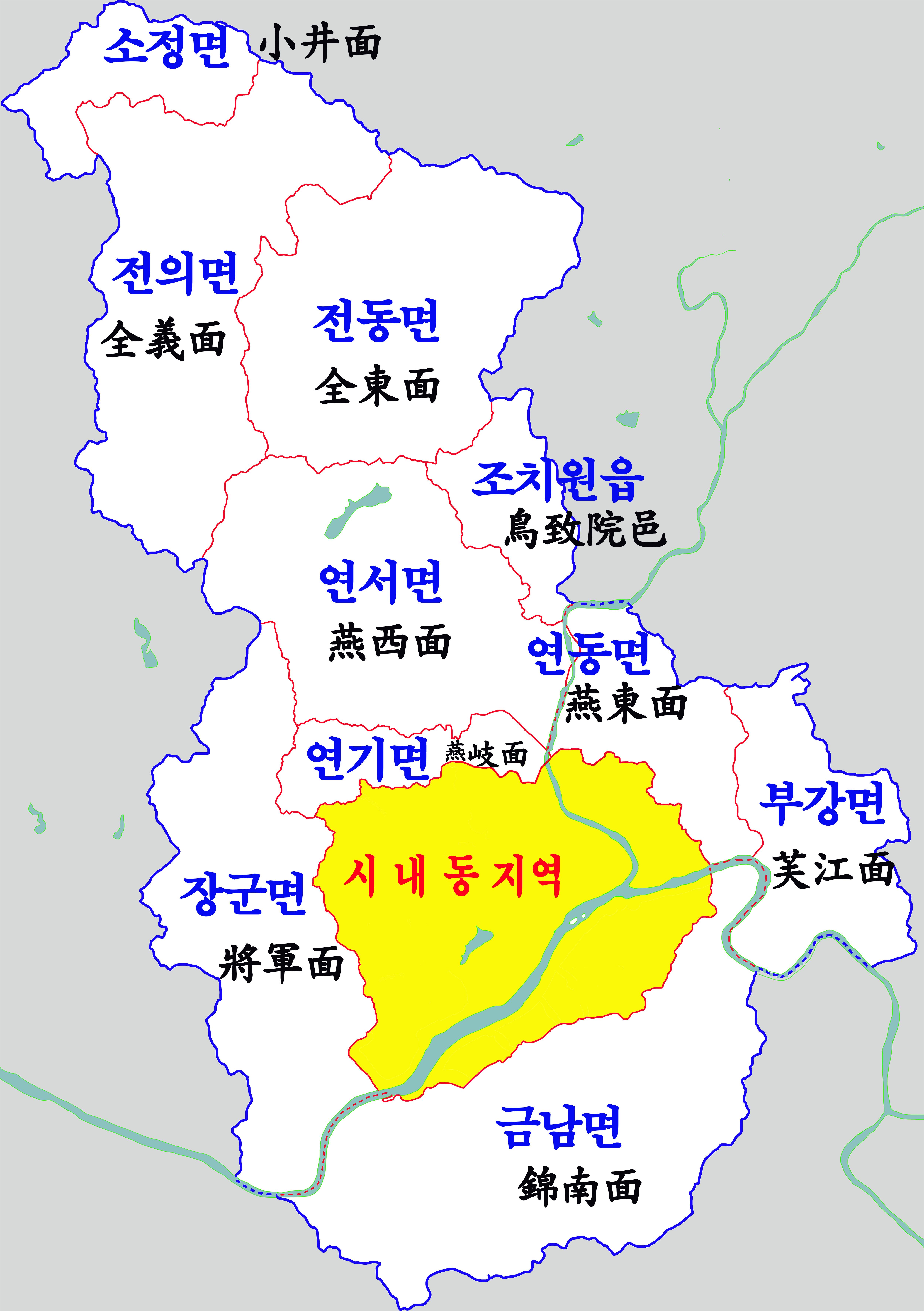 세종시 행정구역